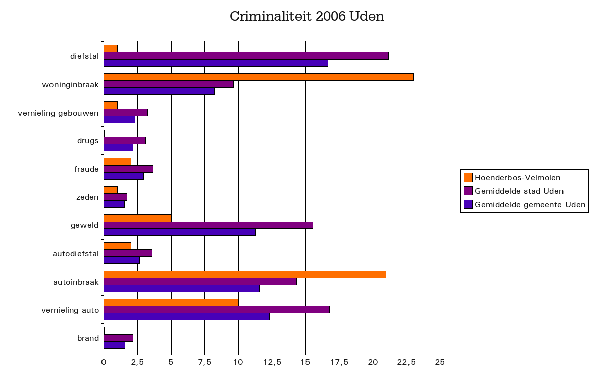 Criminaliteitcijfers in Uden Hoenderbos-Velmolen (2006), Noord-Brabant, The Netherlands